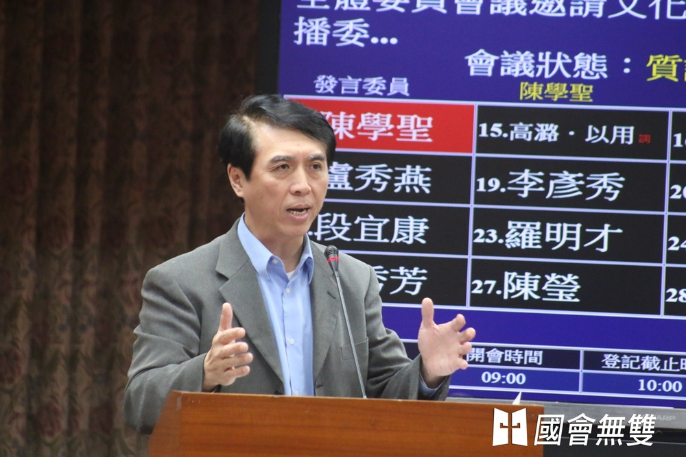 中文（台灣）: 國民黨立委陳學聖於質詢時表示，政府應該比照體育界跟中國交流模式，建立一套藝人和影音藝文產業可以依循的潛規則，以免又踩到中國政治紅線。